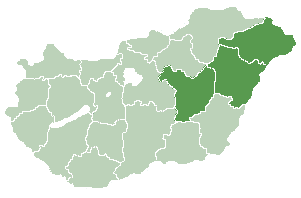 Észak-Alföld region of Hungary.